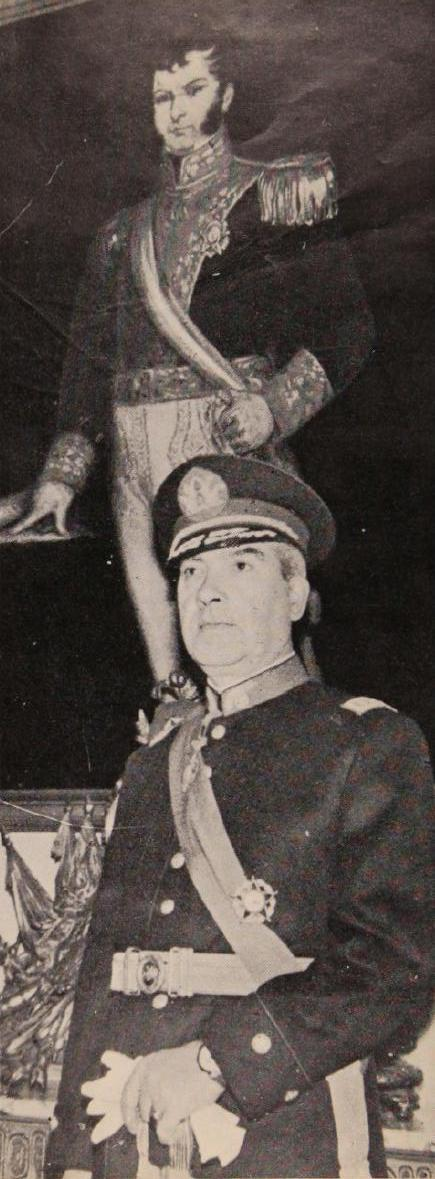 Homenaje del Congreso Nacional de Chile a la memoria del Comandante en Jefe del Ejército general René Schneider Chereau.